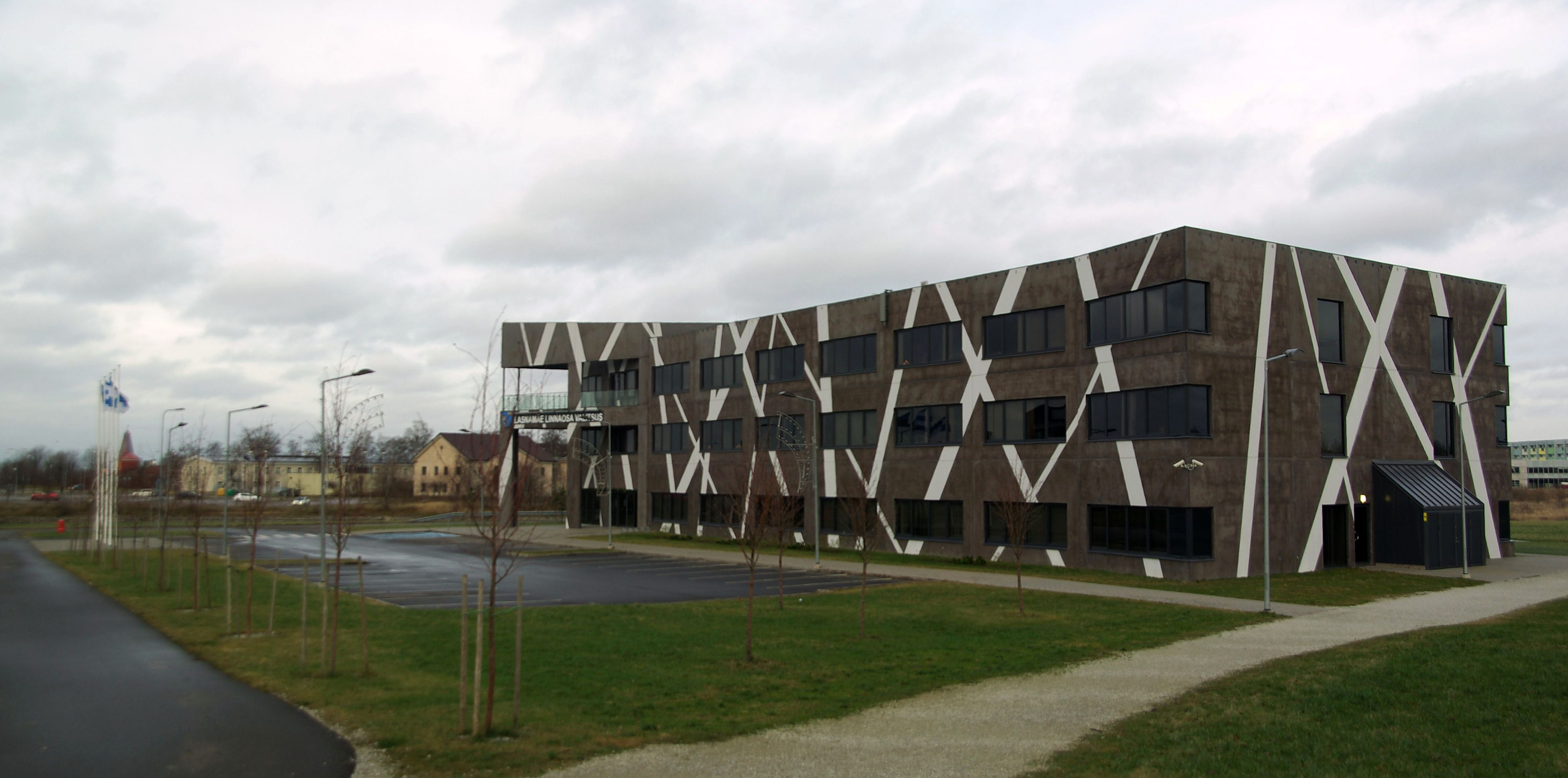 Pallasti tänav 54,Tallinn